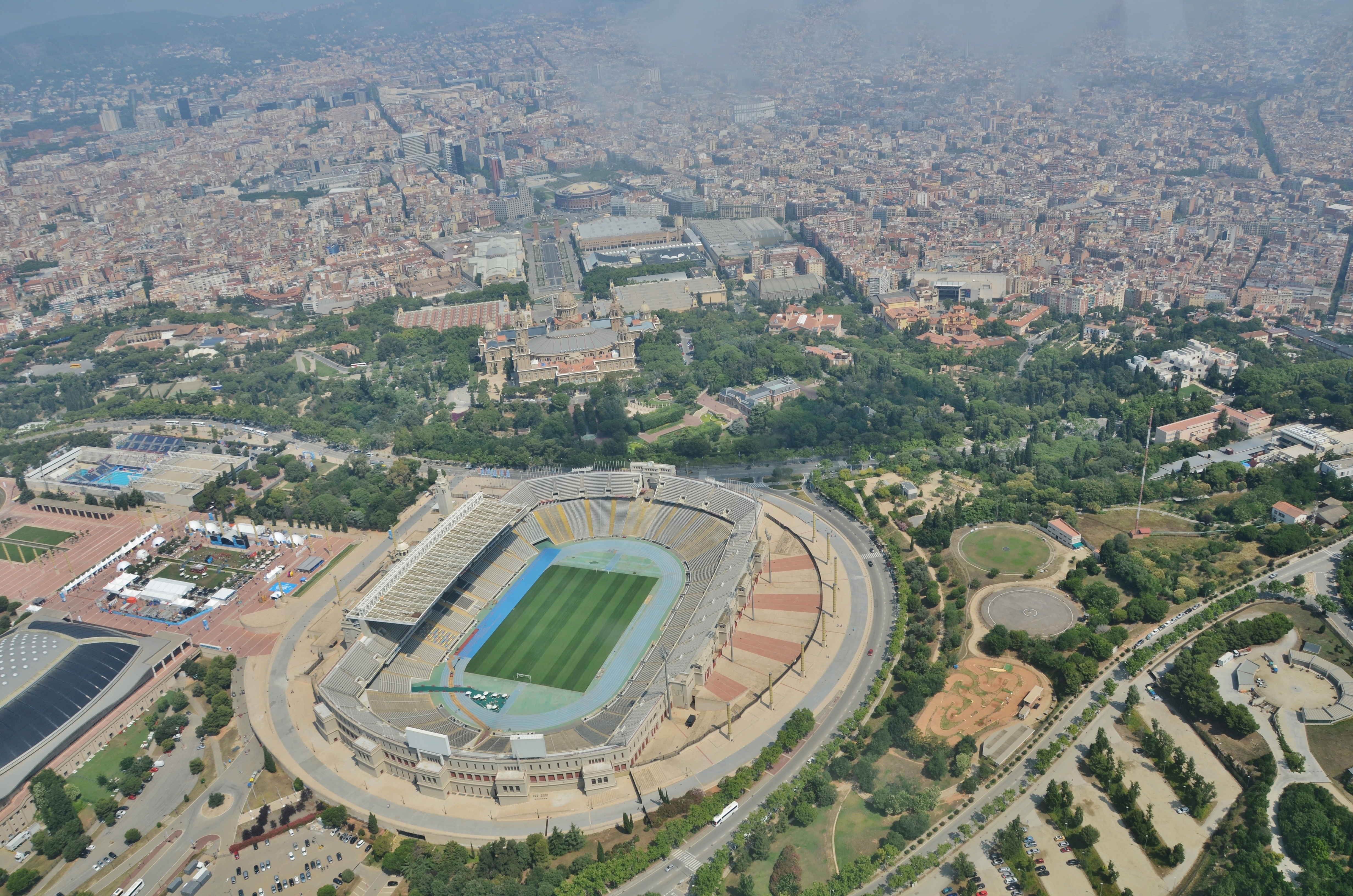 Estadi de l'Exposició de 1929 (Barcelona)